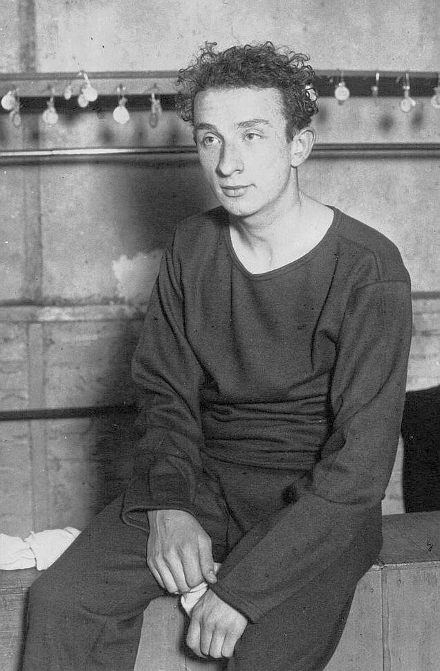 Piscine Danton, water-polo : Taris (portrait) : [photographie de presse] / Agence Meurisse